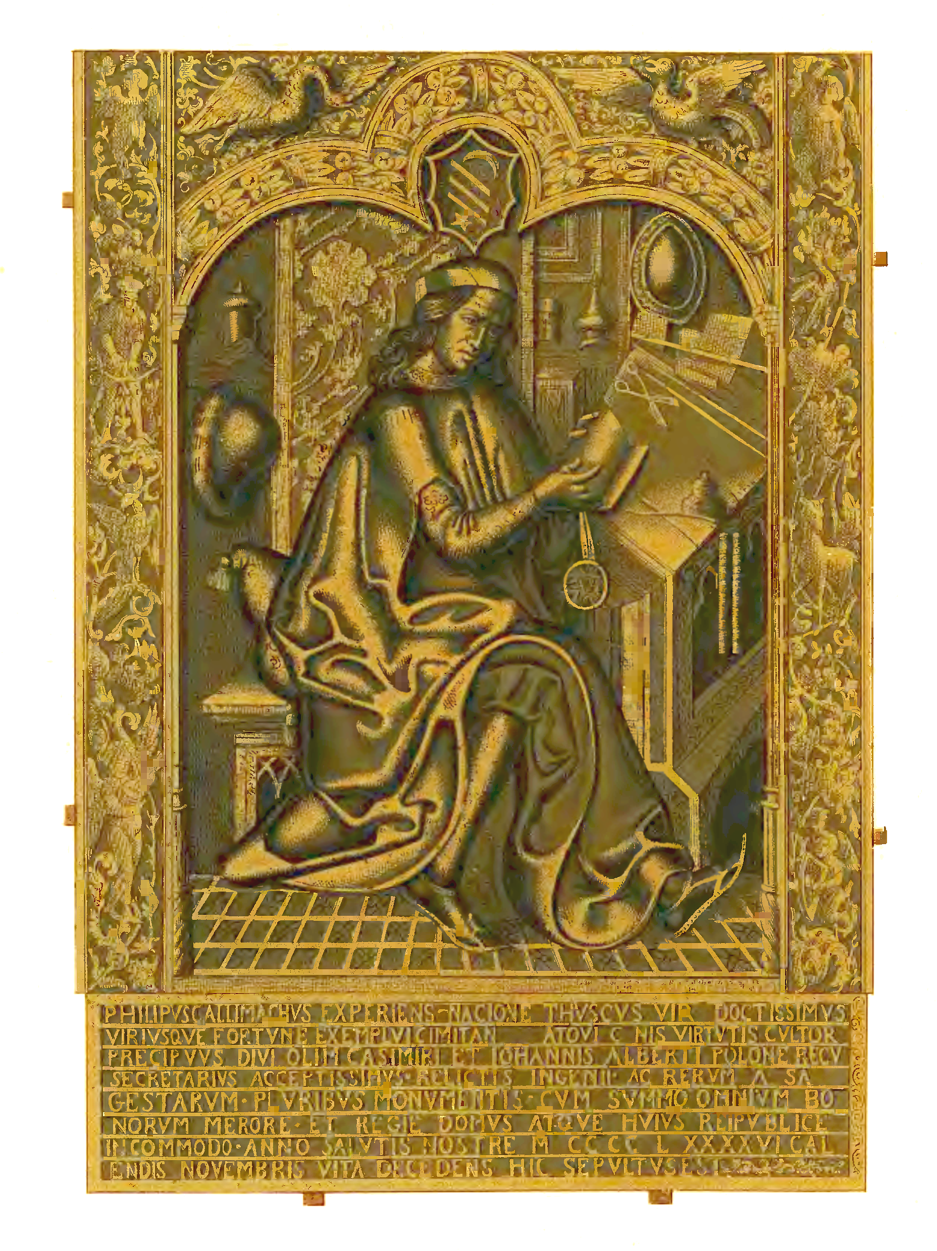 Tomb of Filippo Buonaccorsi called Filip Callimachus in Saint Trinity Church in Krakow. A chromolitograph from: Aleksander Przezdziecki, Edward Rastawiecki, Wzory sztuki średniowiecznej i z epoki Odrodzenia po koniec wieku XVII. Serya 1, 1853-1855